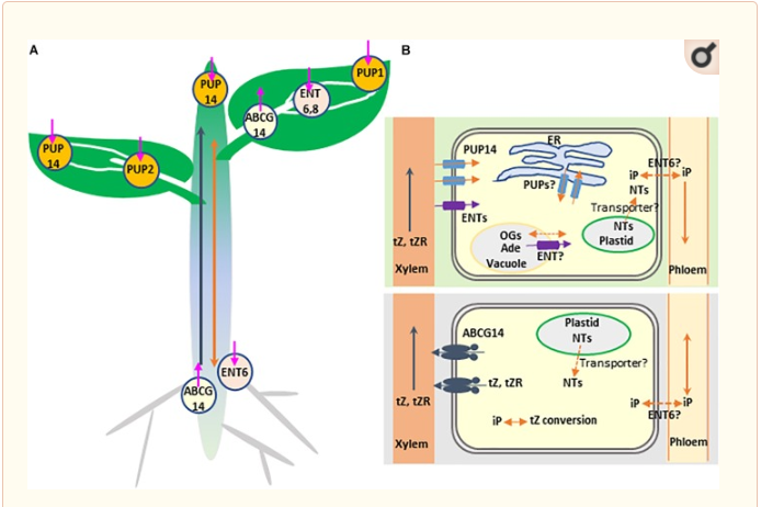 A biossíntese de citocinina é realizada através da transferência do grupo isopentenil do IPP